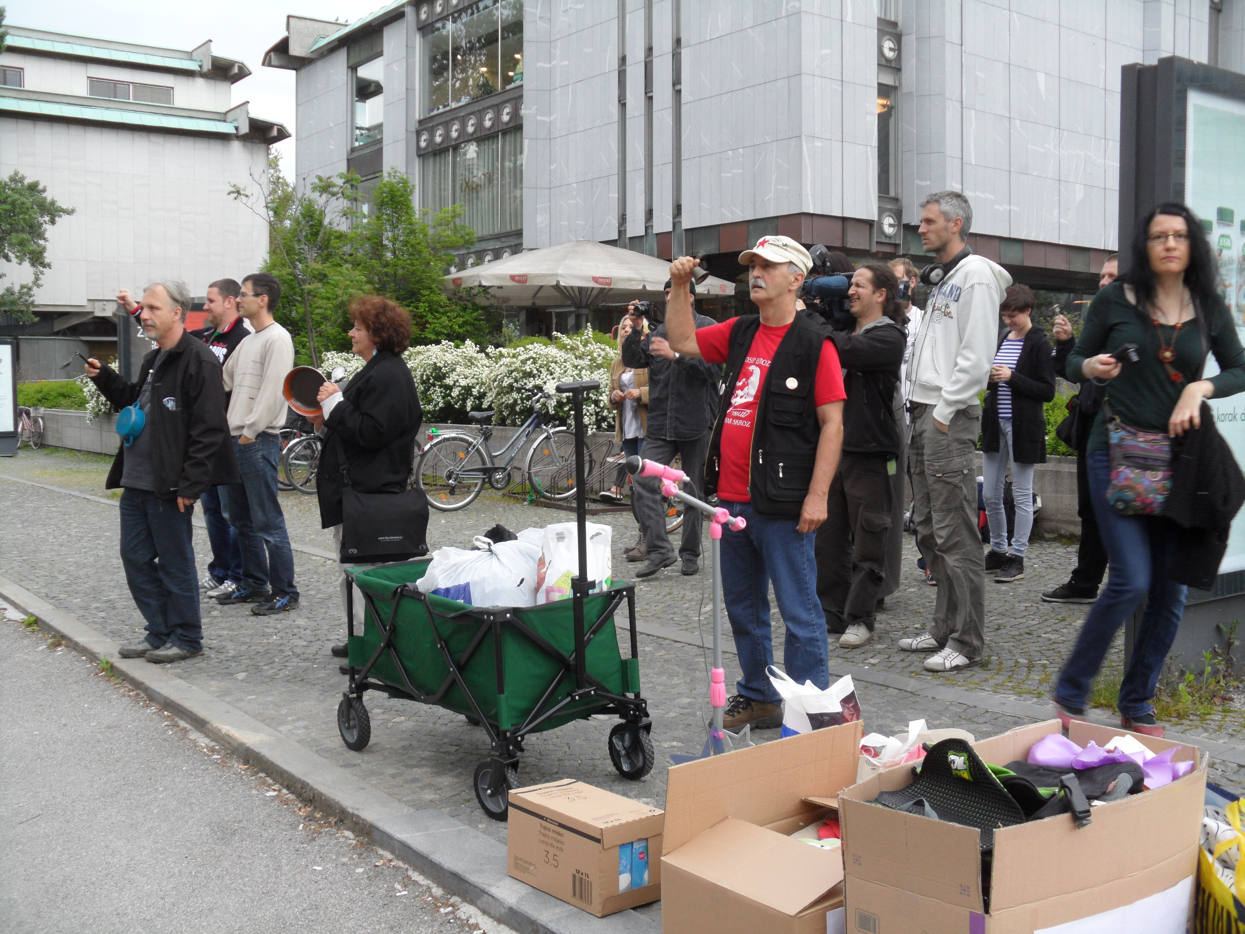 Čezvesoljska zombi cerkev blaženega zvonjenja za svoje obrede uporablja zvonce, piskre in ponve, obrede najpogosteje izvaja na Trgu republike, med svojimi obredi pa zbira hrano in oblačila za ZPM in Rdeči križ, mi ju razdelita pomoči potrebnim.